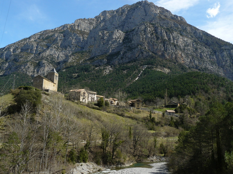 Panorámica de la aldea de Badaín, T.M. de Sin en la Provincia de Huesca desde la desembocadura del río Irués, afluente del Cinca. De fondo, la Punta Llerga